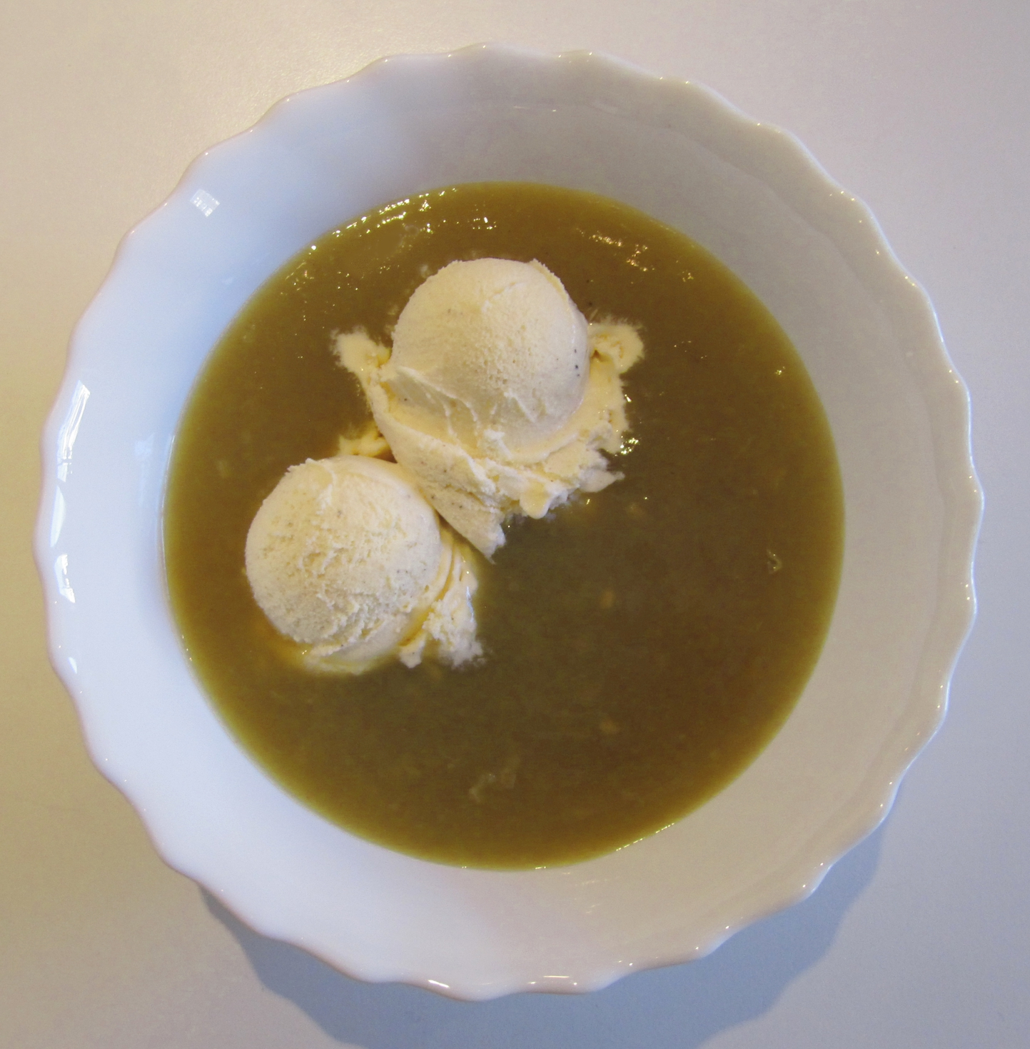 Grüne Grütze mit Vanilleeis (Fertigprodukt von Scandic Food A/S, DK-7100 Vejle, März 2016)